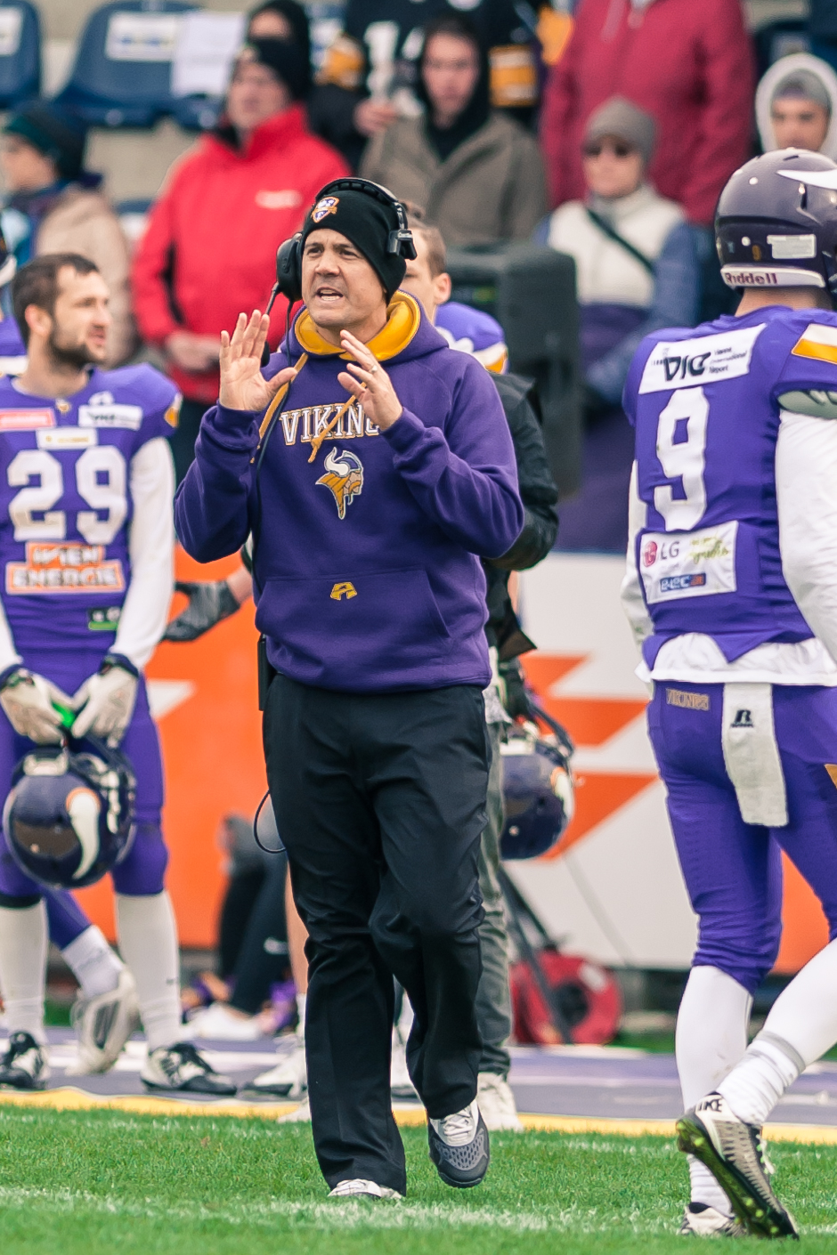 BIG6 European Football League - Vienna Vikings vs New Yorker Lions Braunschweig am 24. April 2016 in Wien. Bild zeigt Headcoach Chris Calaycay (Vienna Vikings).